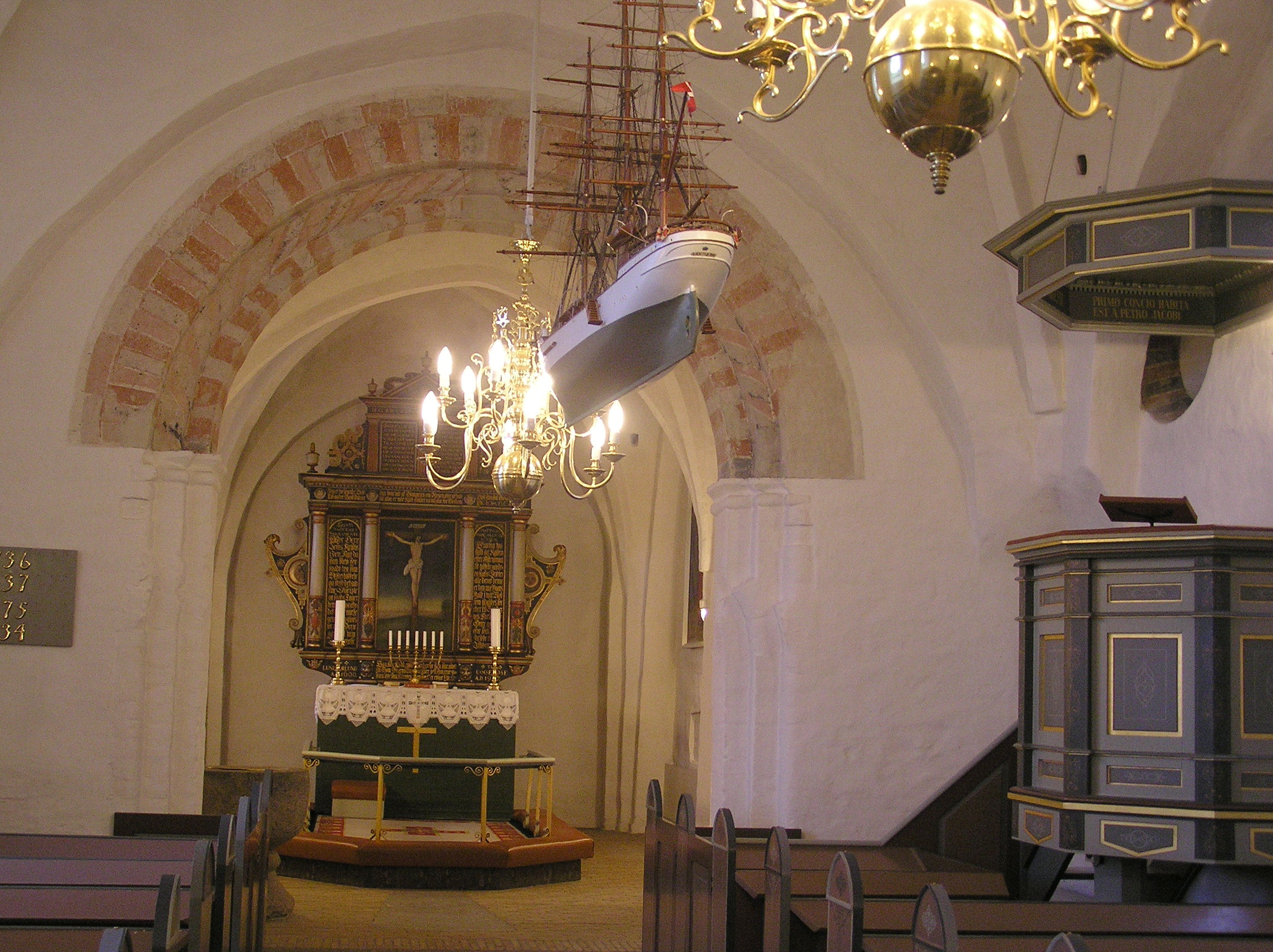 Skoleskibet ’Danmark’ i kirkerummet i Uggeløse Kirke. Skibet er renoveret 1995 af maler Ove Andersen, Slagelse